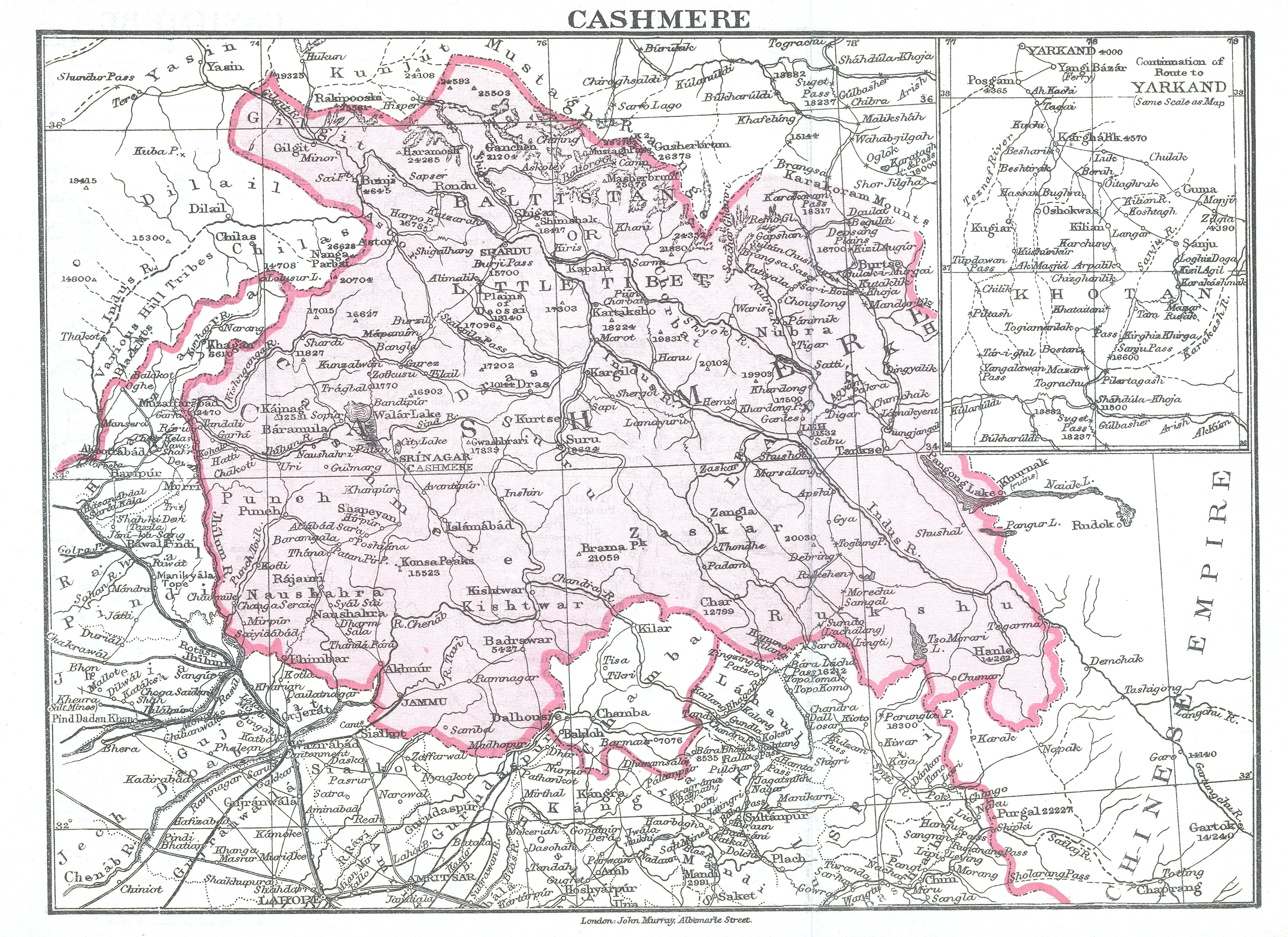 Cashmere (Kashmir) in 1903